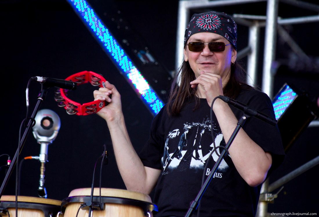 Евгений Баринов, ударник группы "Чиж&Co", Рок-над-Волгой 2013